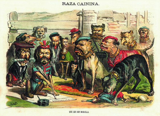 Imagen de la exposición "El siglo XIX en caricaturas". Organizada por el Museo Zumalakarregi.